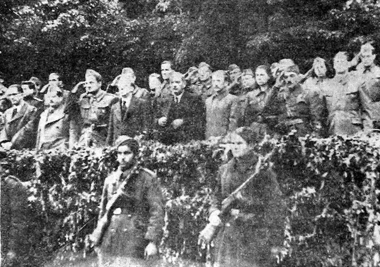 Ajdovska vlada- Narodna vlada Slovenije v Ajdovščini 5. maja 1945.